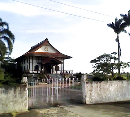 Templo Budista